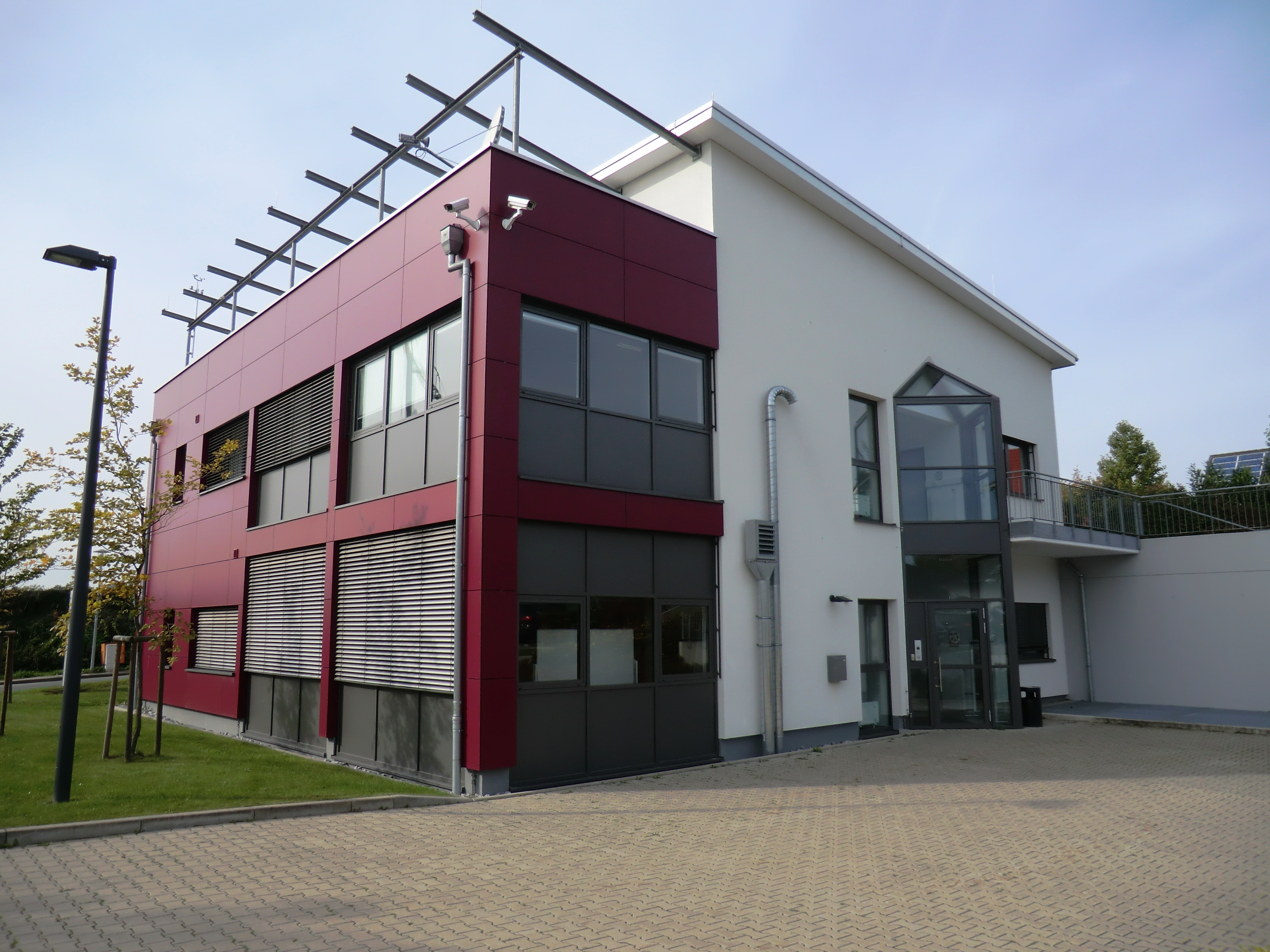 Kreisfeuerwehrzentrale Kreis Herford. Standort Eilshausen, Königsberger Straße12 / Meierstraße 43.